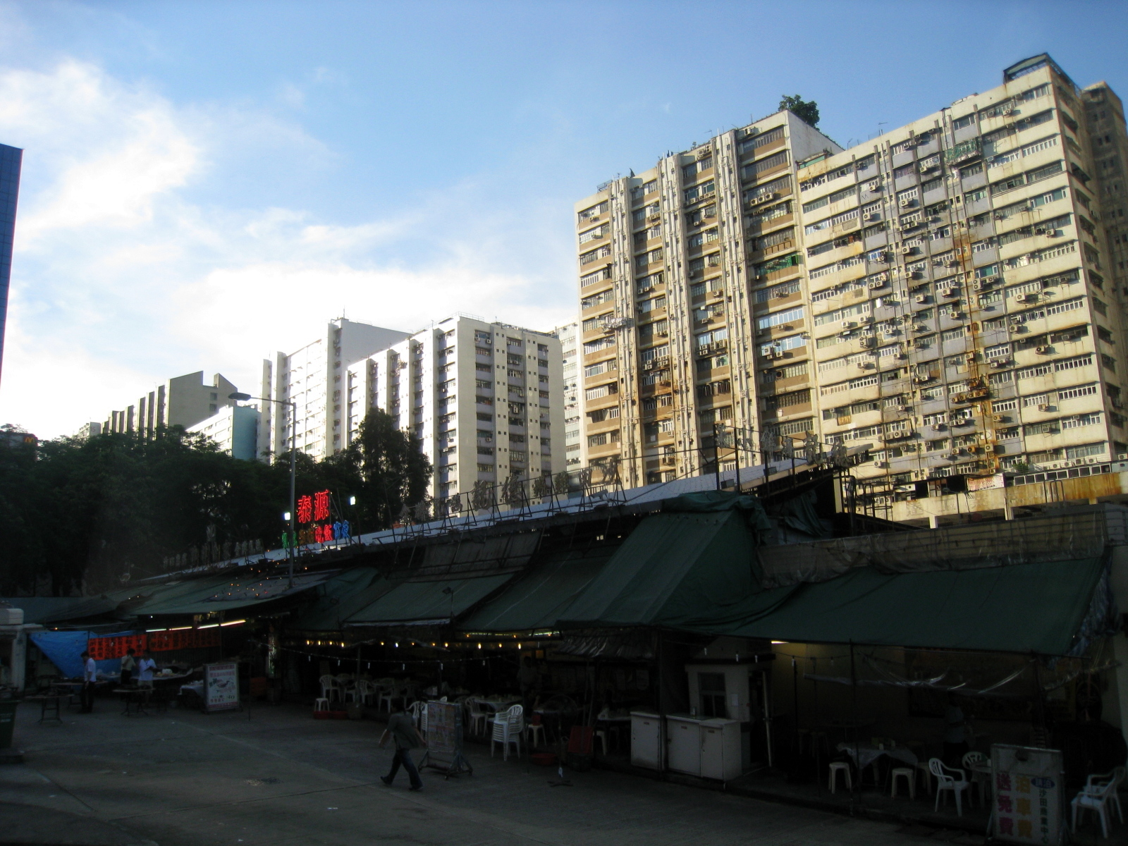 Fo Tan 火炭